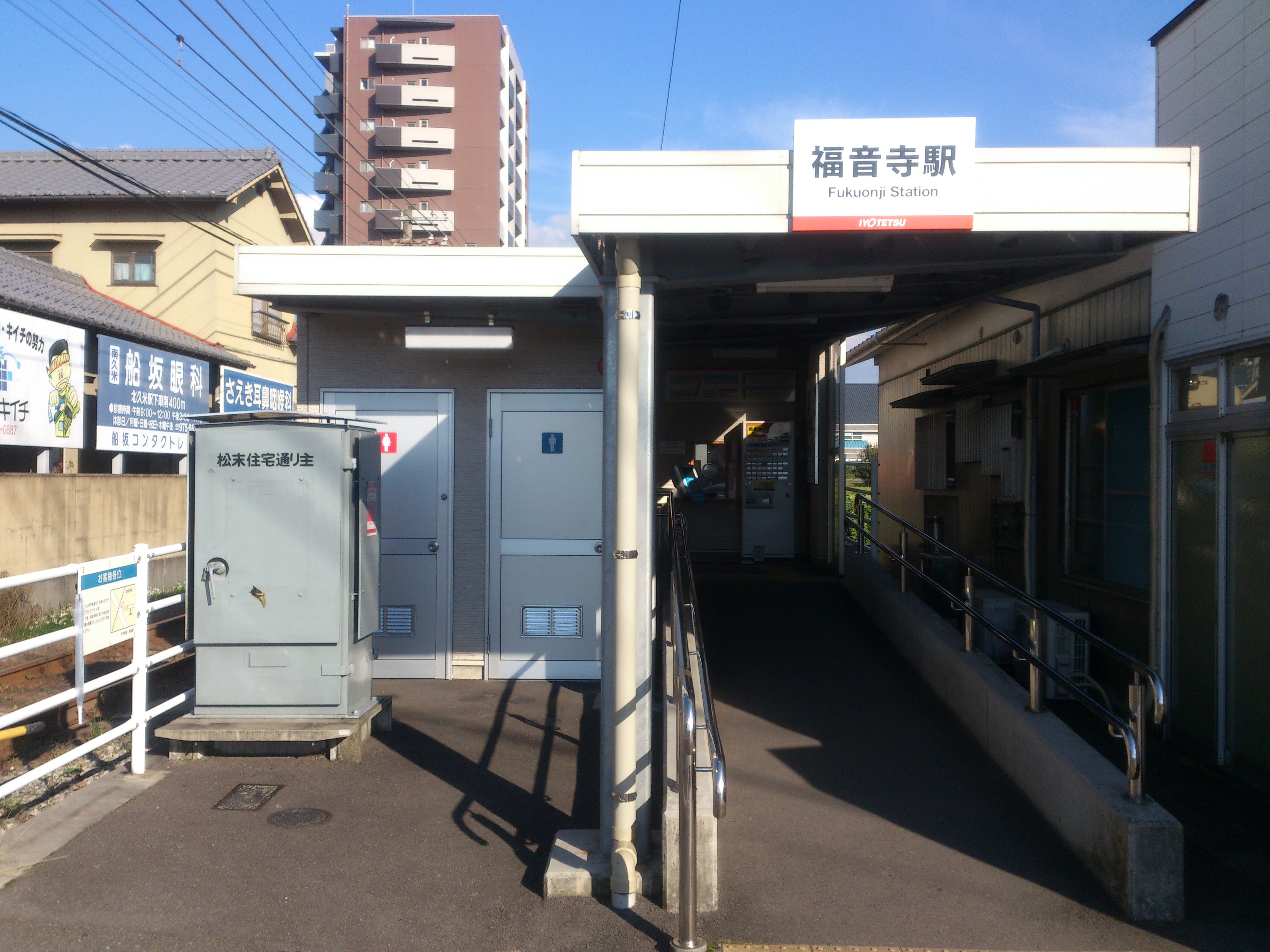 伊予鉄道 福音寺駅